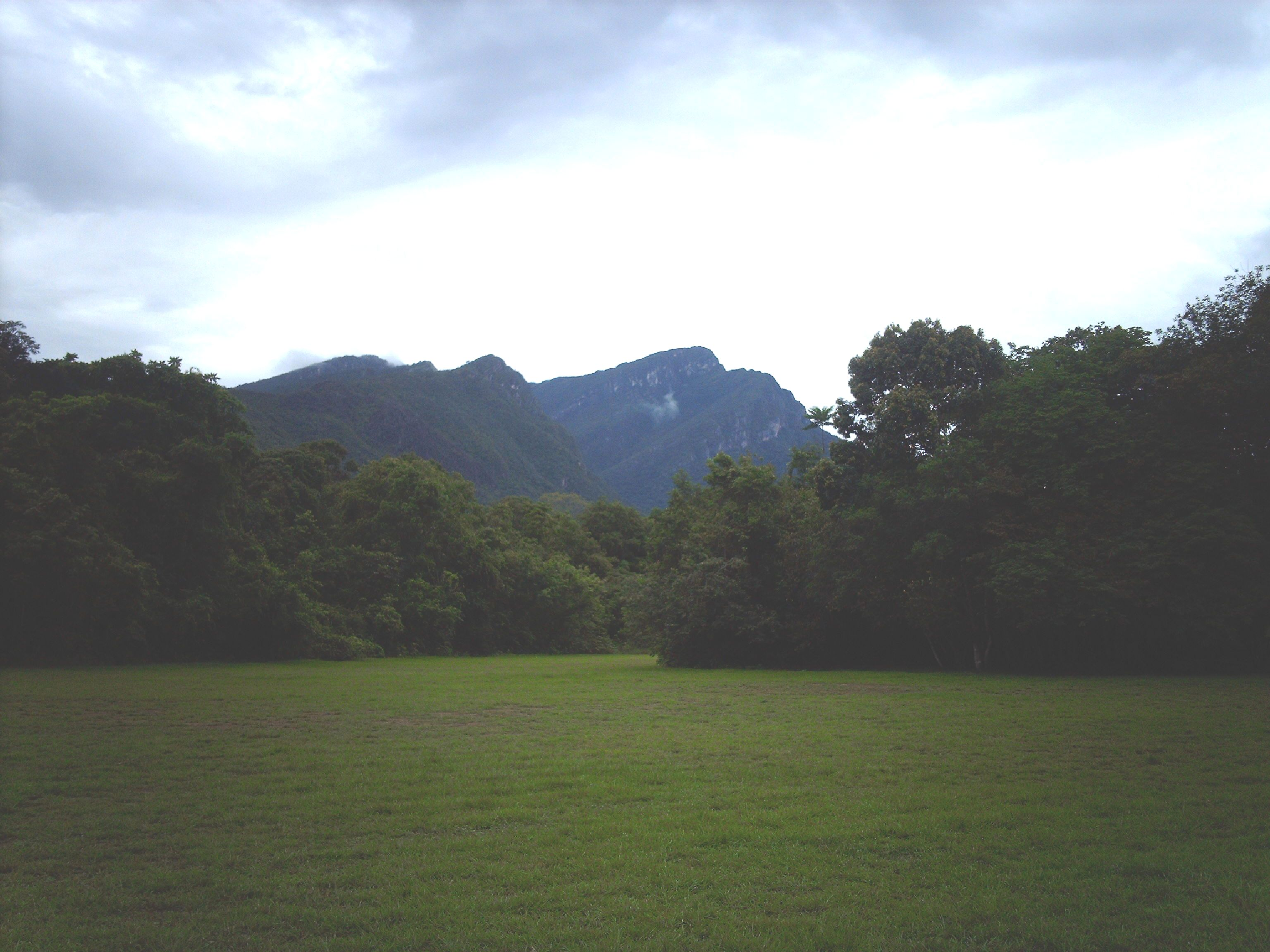 Selva del Amazonas, Manapiare, Venezuela